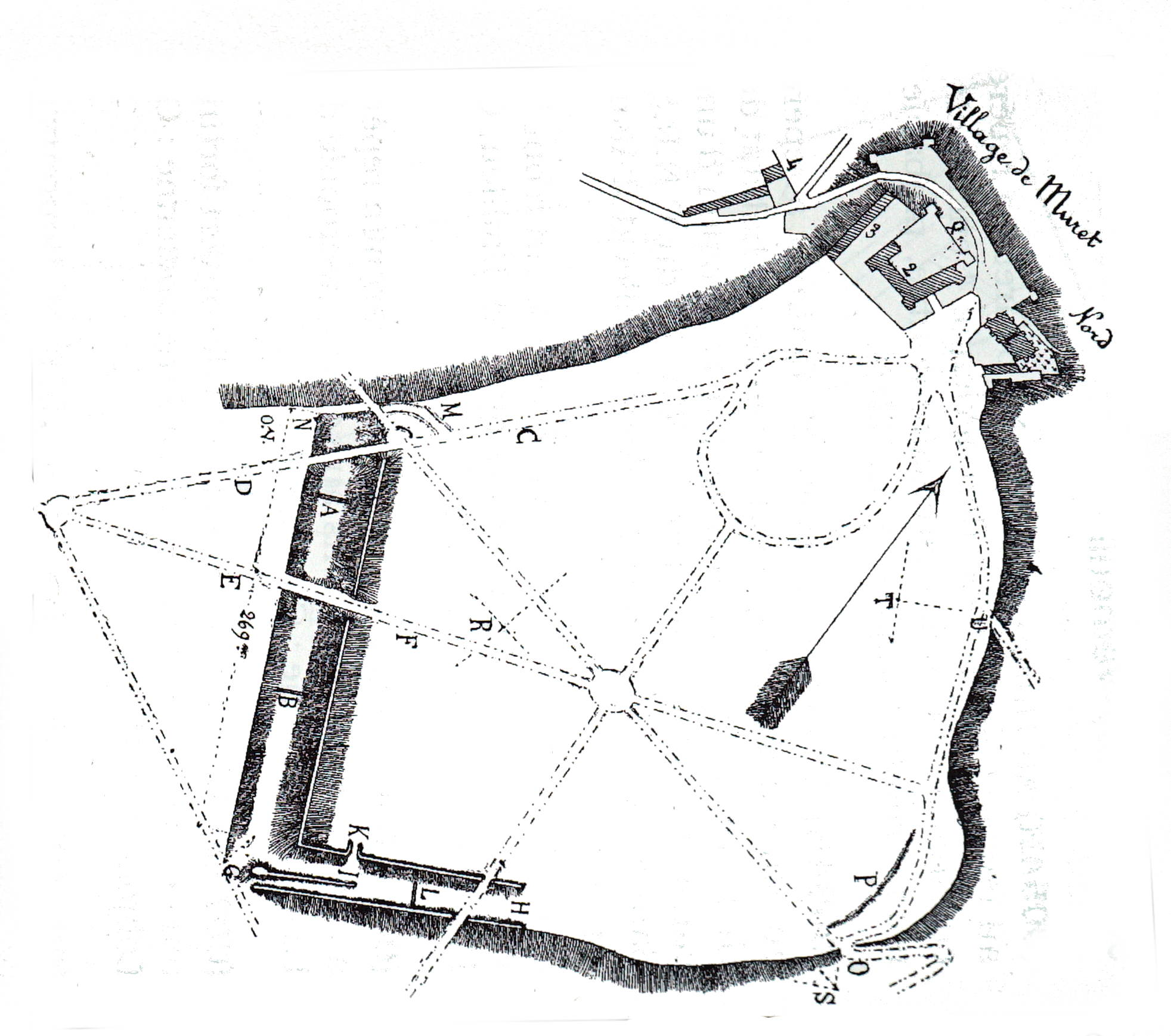 image des fouilles.